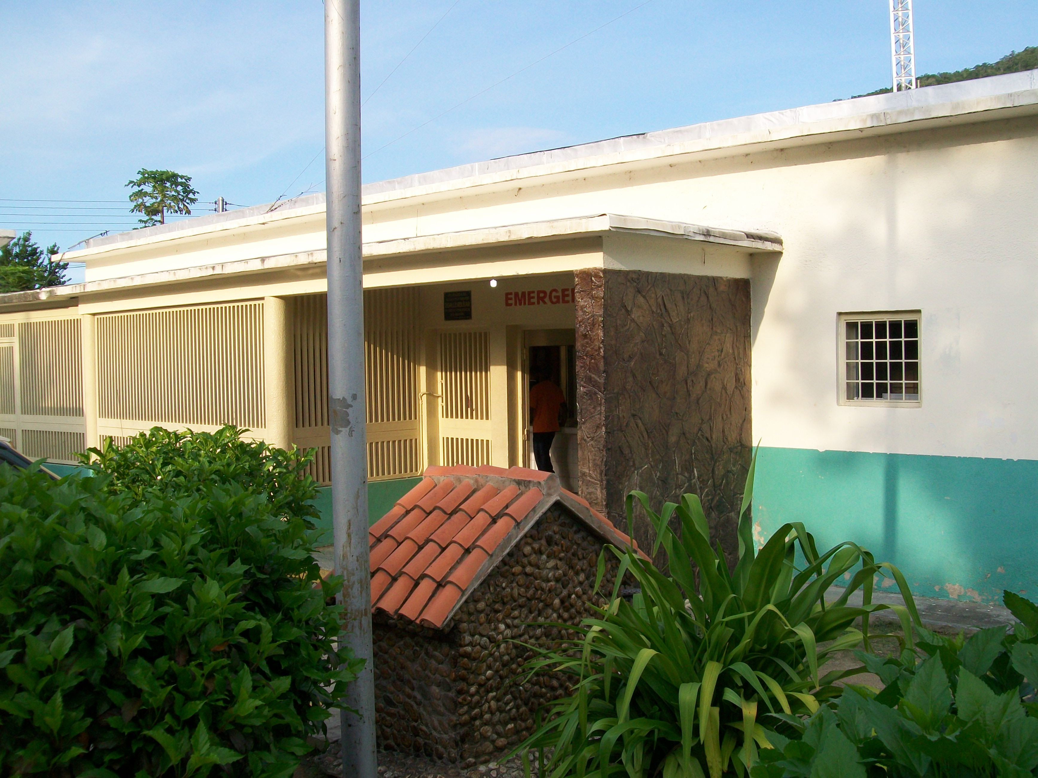 Ambulatorio de Ocumare de la Costa, Venezuela.